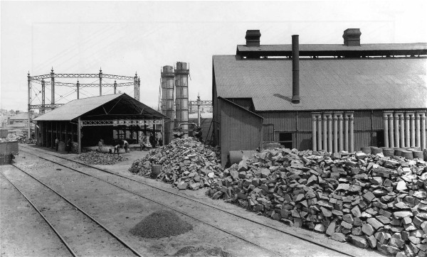 Gasworks at Eveleigh